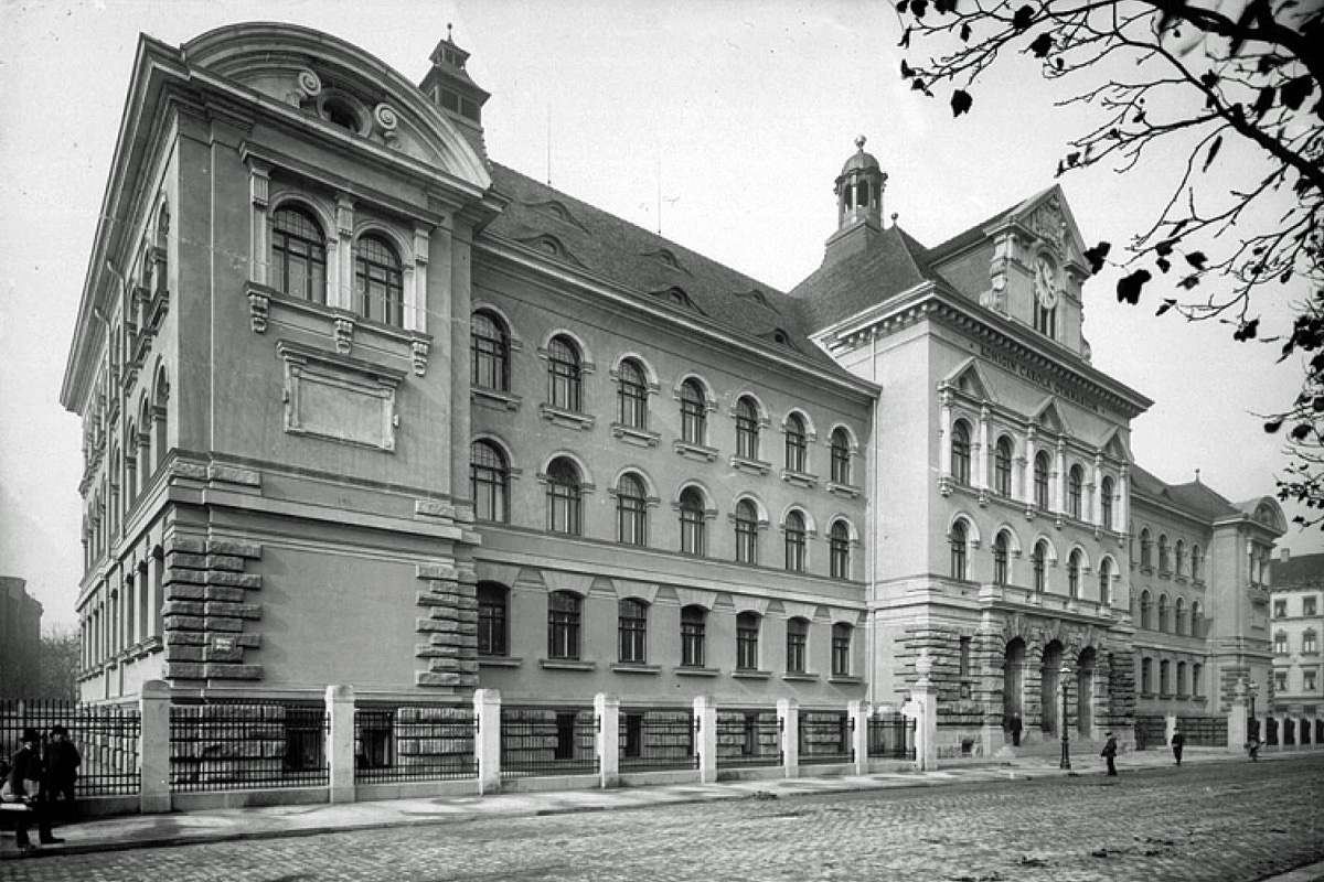 Straßenansicht des Königin-Carola-Gymnasiums in Leipzig